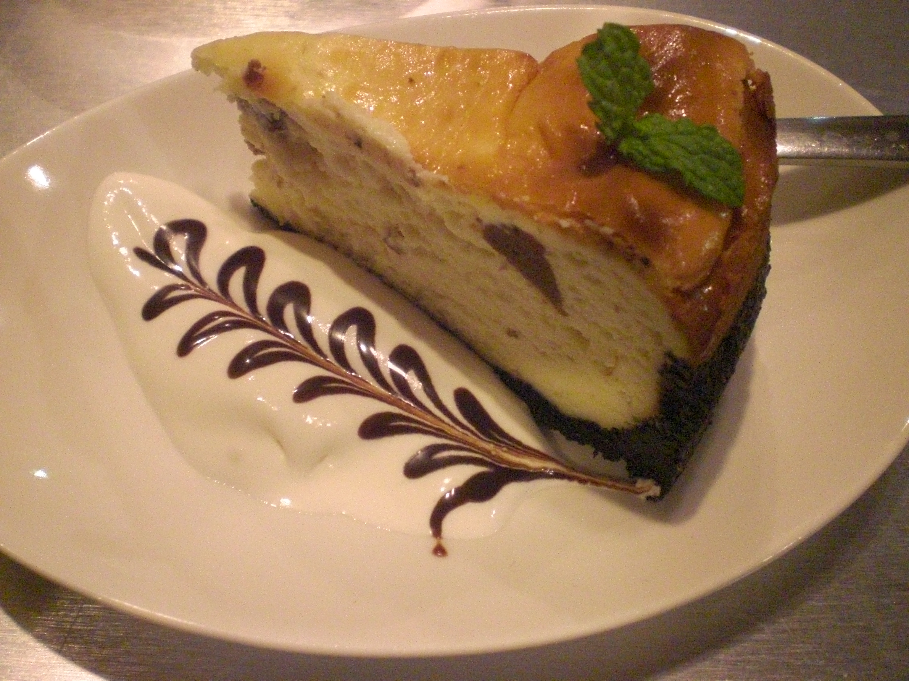 一塊起司蛋糕